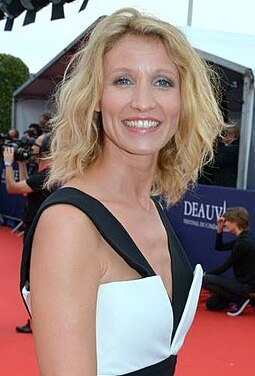 Alexandra Lamy au festival de Deauville